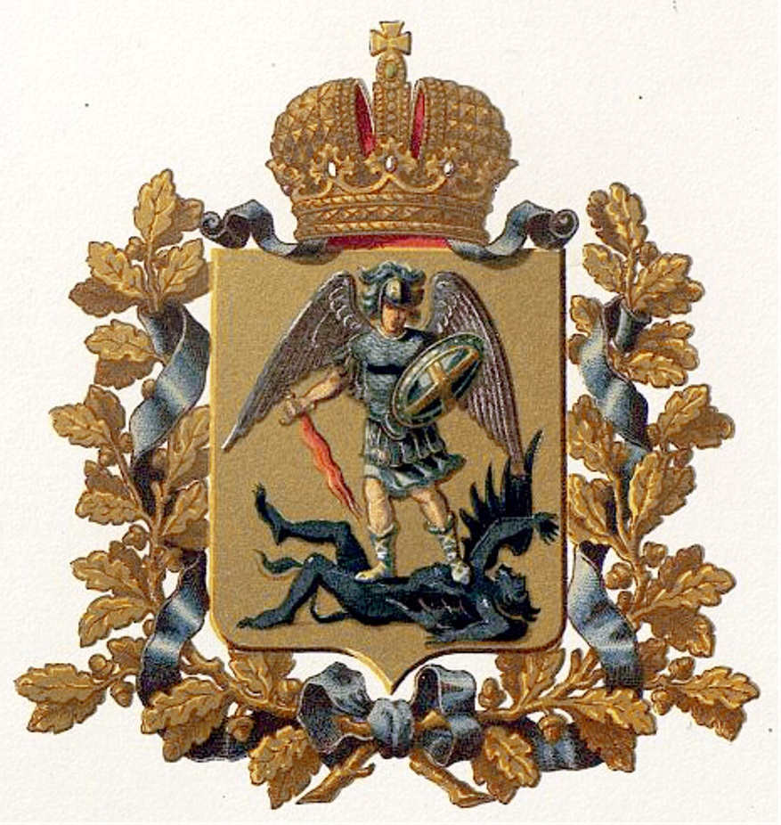 Official Russian Empire coat of arms Arkhangelsk Governorate. Гласный герб Российской Империи Архангельской губернии в Гербовнике Министерства внутренних дел Российской Империи 1880 года. Утверждён Императором Всероссийским Александром Вторым 5 июля 1878 года.